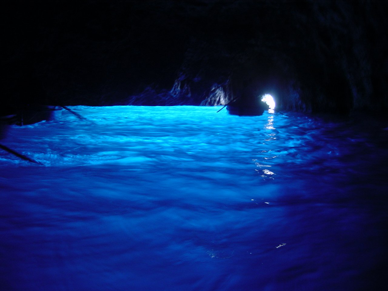 Capri, interno della Grotta Azzurra. Blue Grotto Capri, view from the inside.